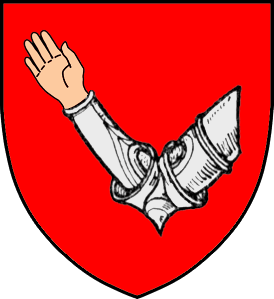 Vapensköld för finländska adelsätten Stålarm nummer 32